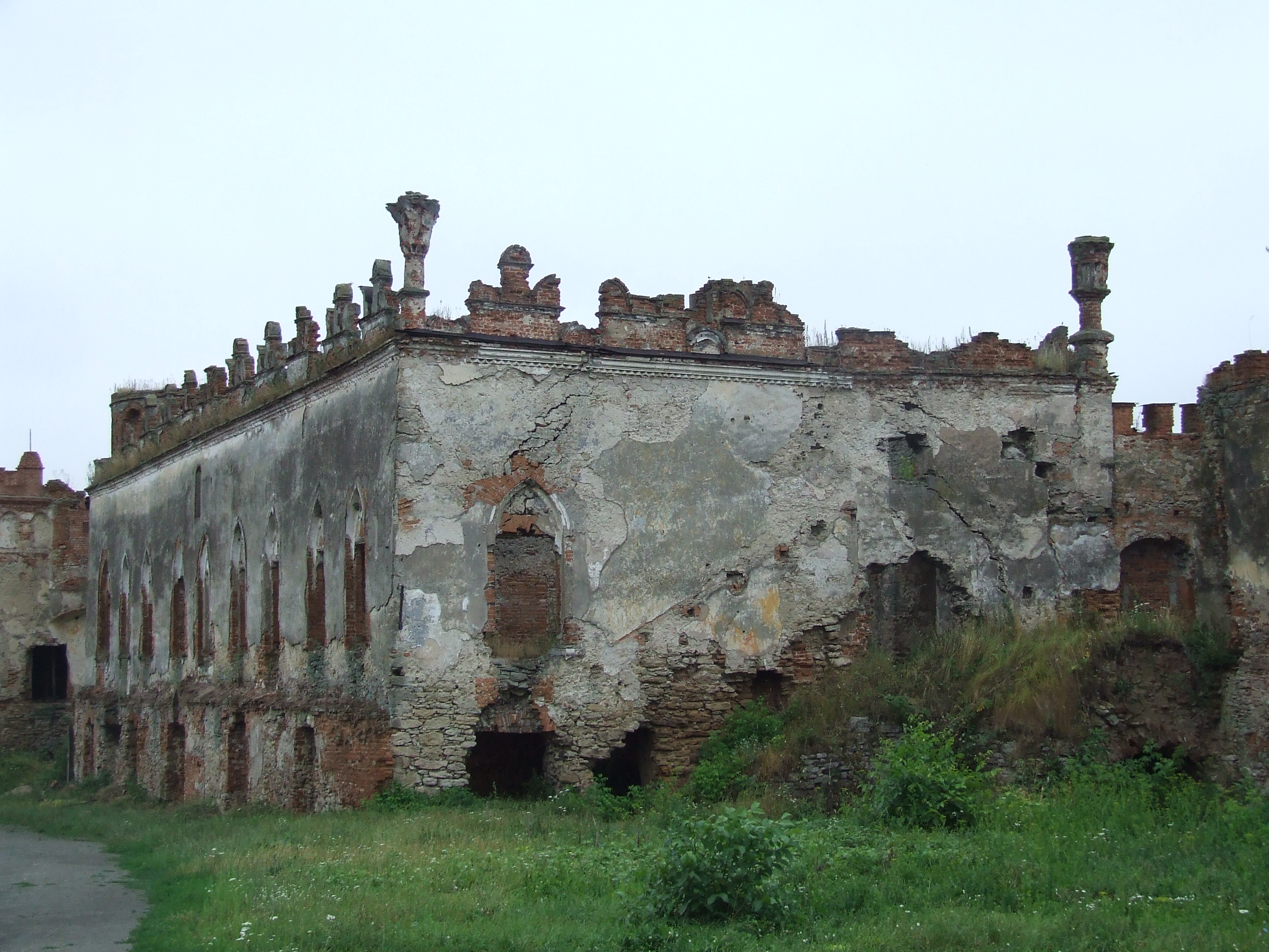 Старовинний замок